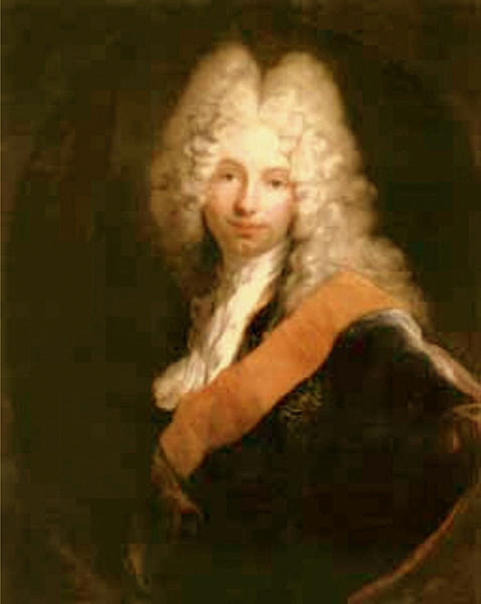 Friedrich Wilhelm Kettler, Duke of Courland